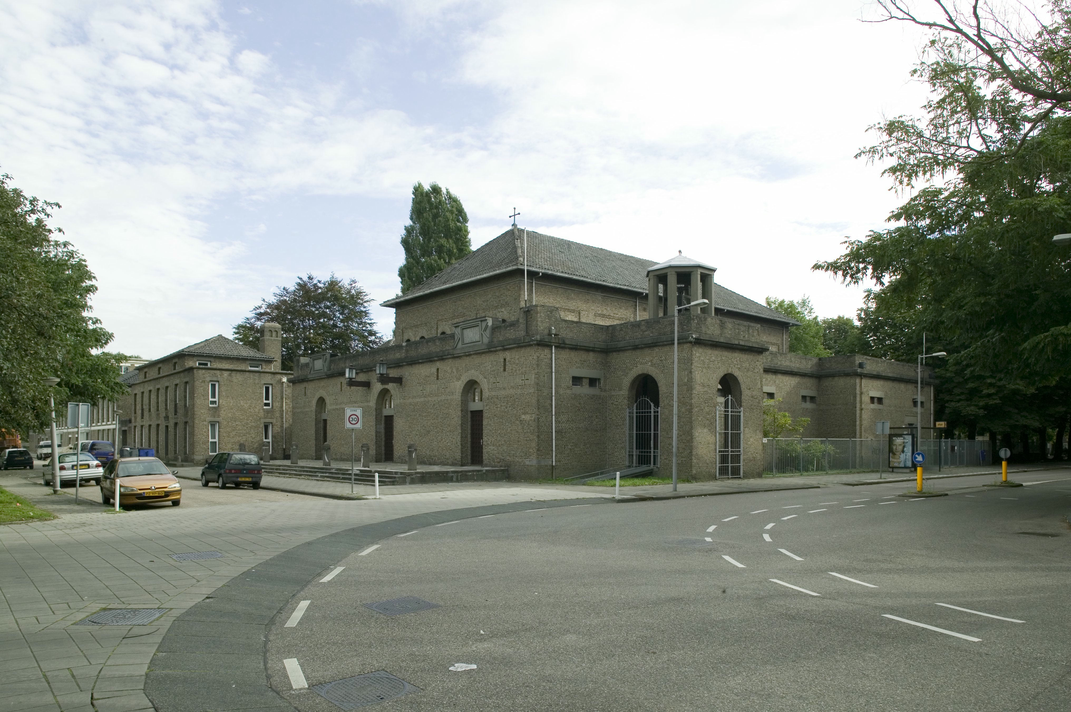 Rooms-katholieke Catharinakerk: Overzicht van de zuid en westgevel, gezien vanaf de openbare weg (opmerking: Gefotografeerd voor Monumenten van Herrezen Nederland)